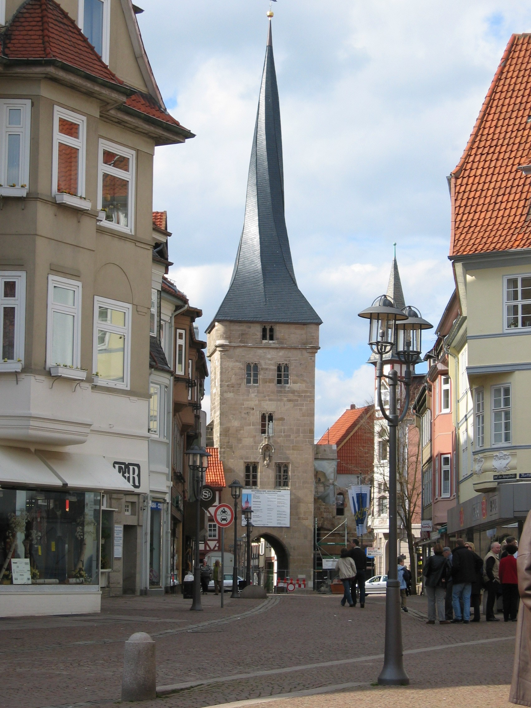 Westerturm - Wahrzeichen der Stadt Duderstadt (Aufgenommen mit: Canon Digital IXUS 400 Copyright)